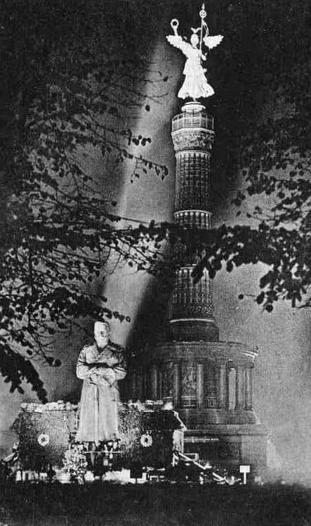 Eisener HIndenburg